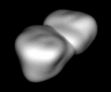 Immagine radar dell'asteroide 4769 Castalia